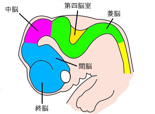 6週目のヒトの胎児の頭部